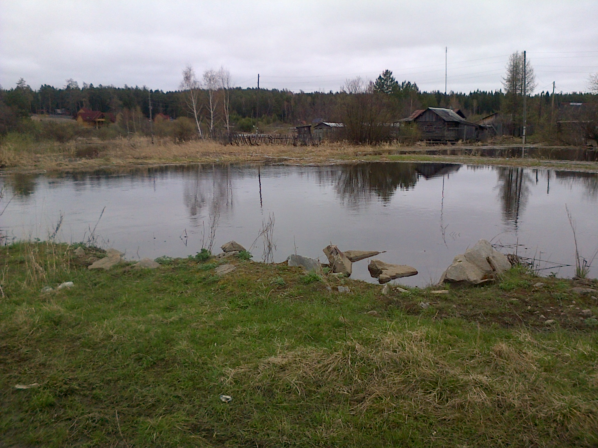 Река Аять